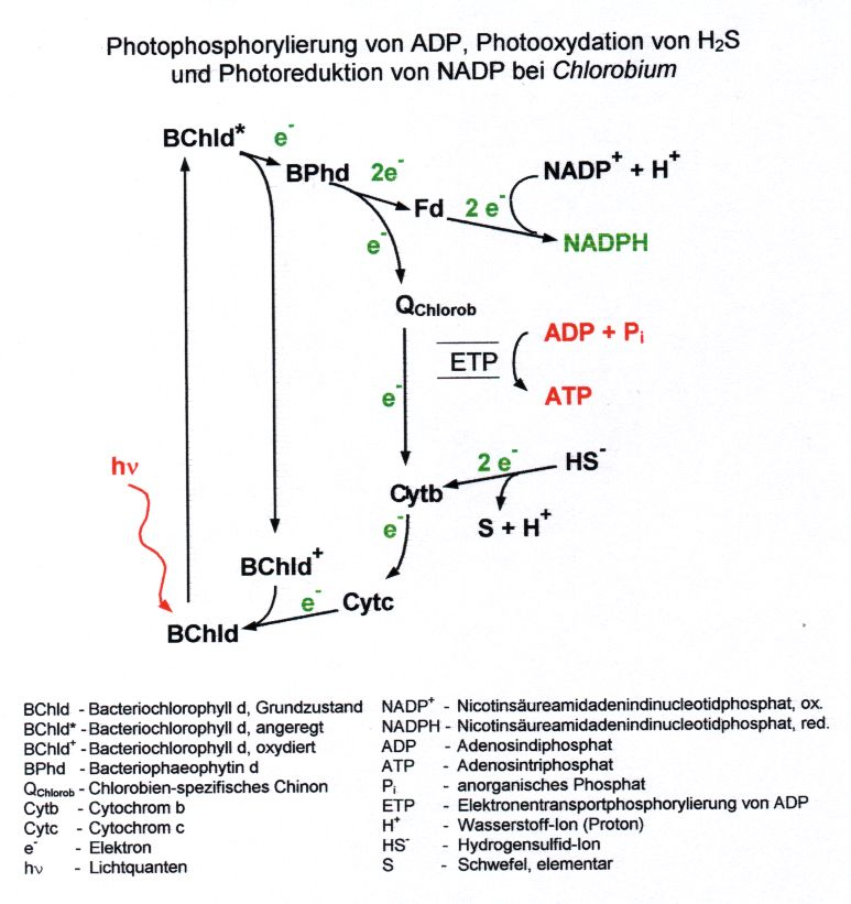 Lichtreaktion bei anoxygener Photosynthese